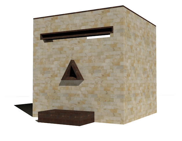 Modello tridimensionale del Monumento a Sandro Pertini di Aldo Rossi a Milano, vista posteriore